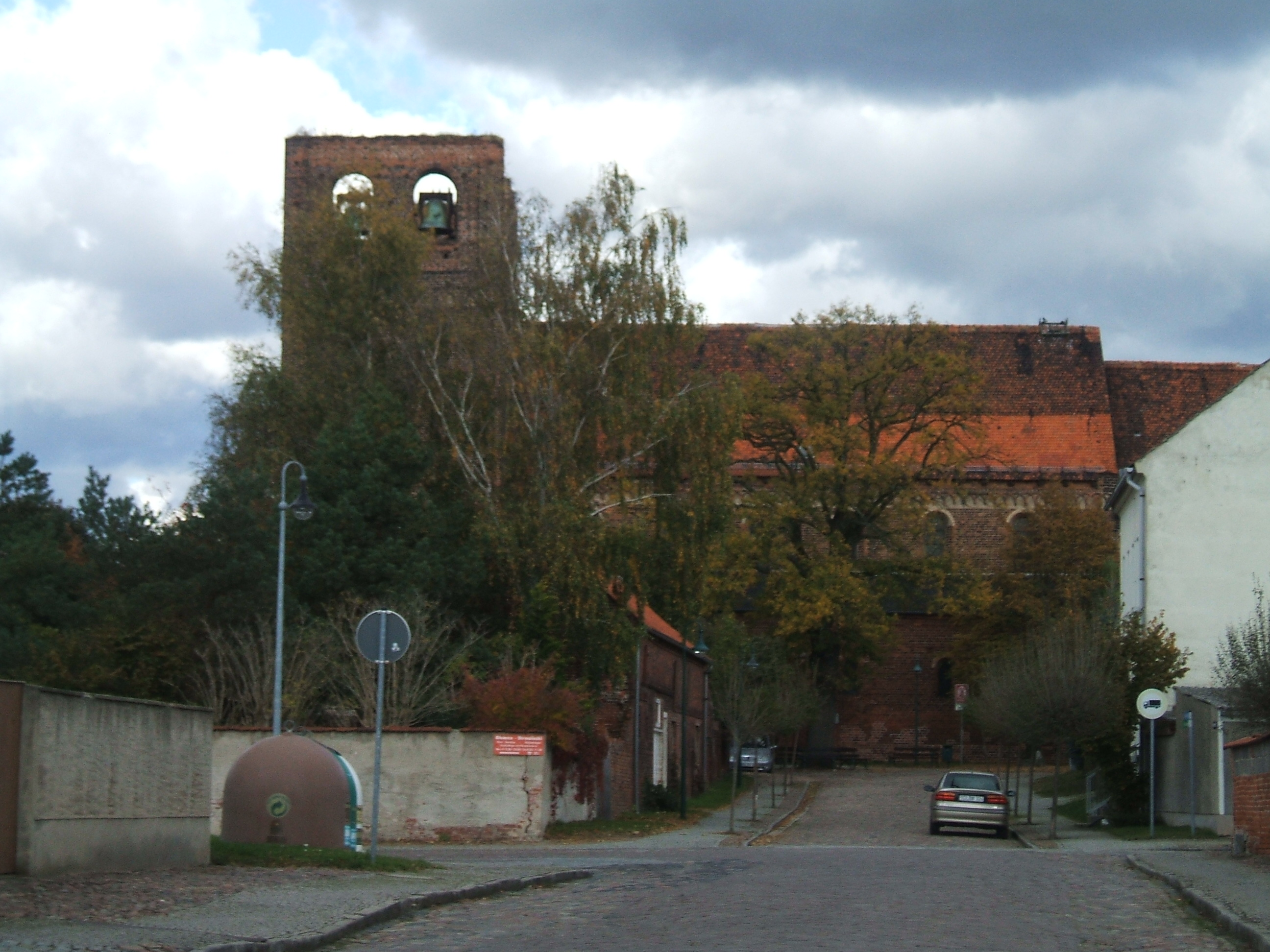 Kirche in Sandau, Sachsen-Anhalt